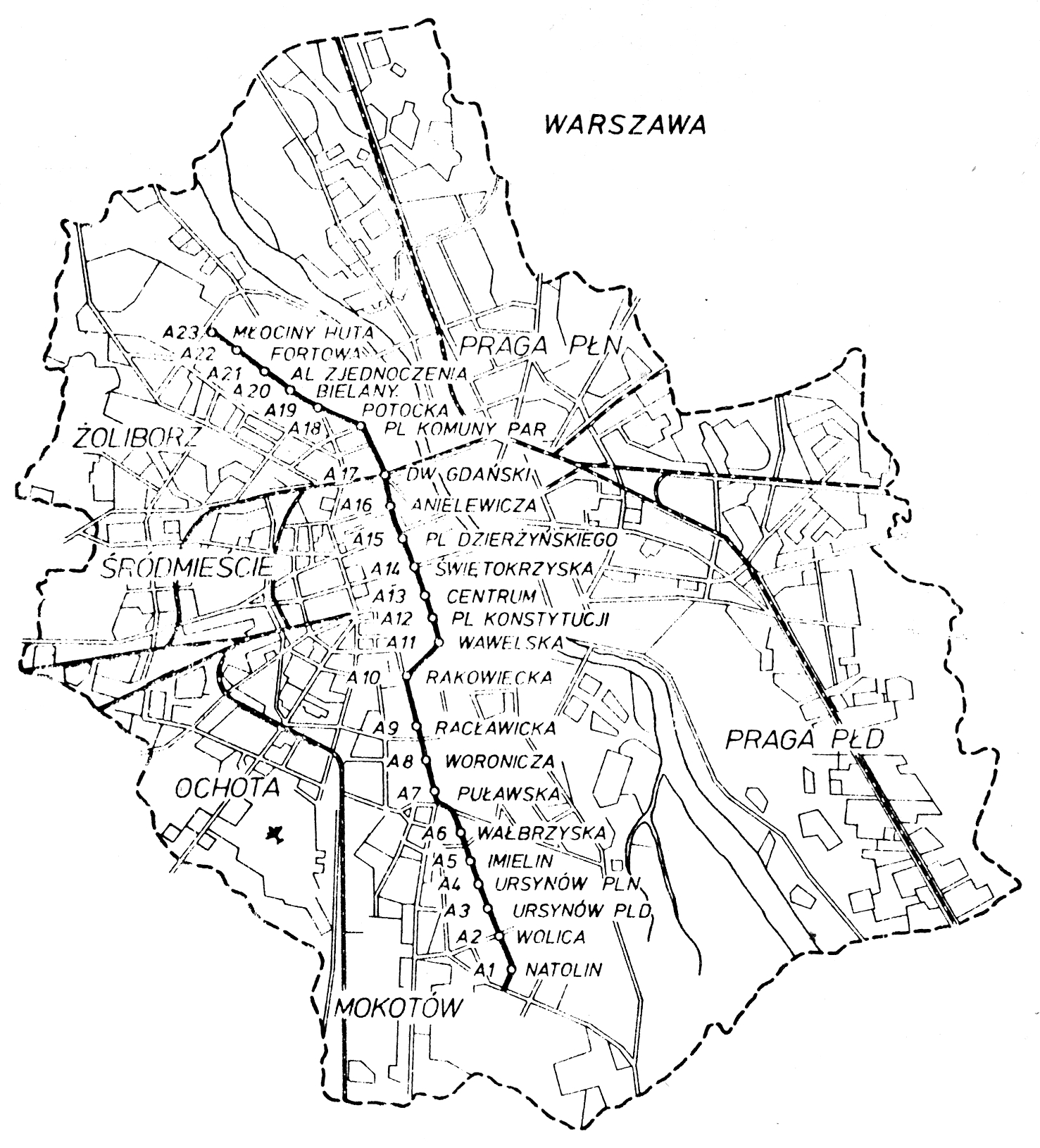 Trasa I linii metra w Warszawie wytyczona w „Założeniach Techniczno-Ekonomicznych budowy I linii metra w Warszawie” opracowanych przez Biuro Projektów Budownictwa Komunalnego i Specjalnego „Metroprojekt” w czerwcu 1982.